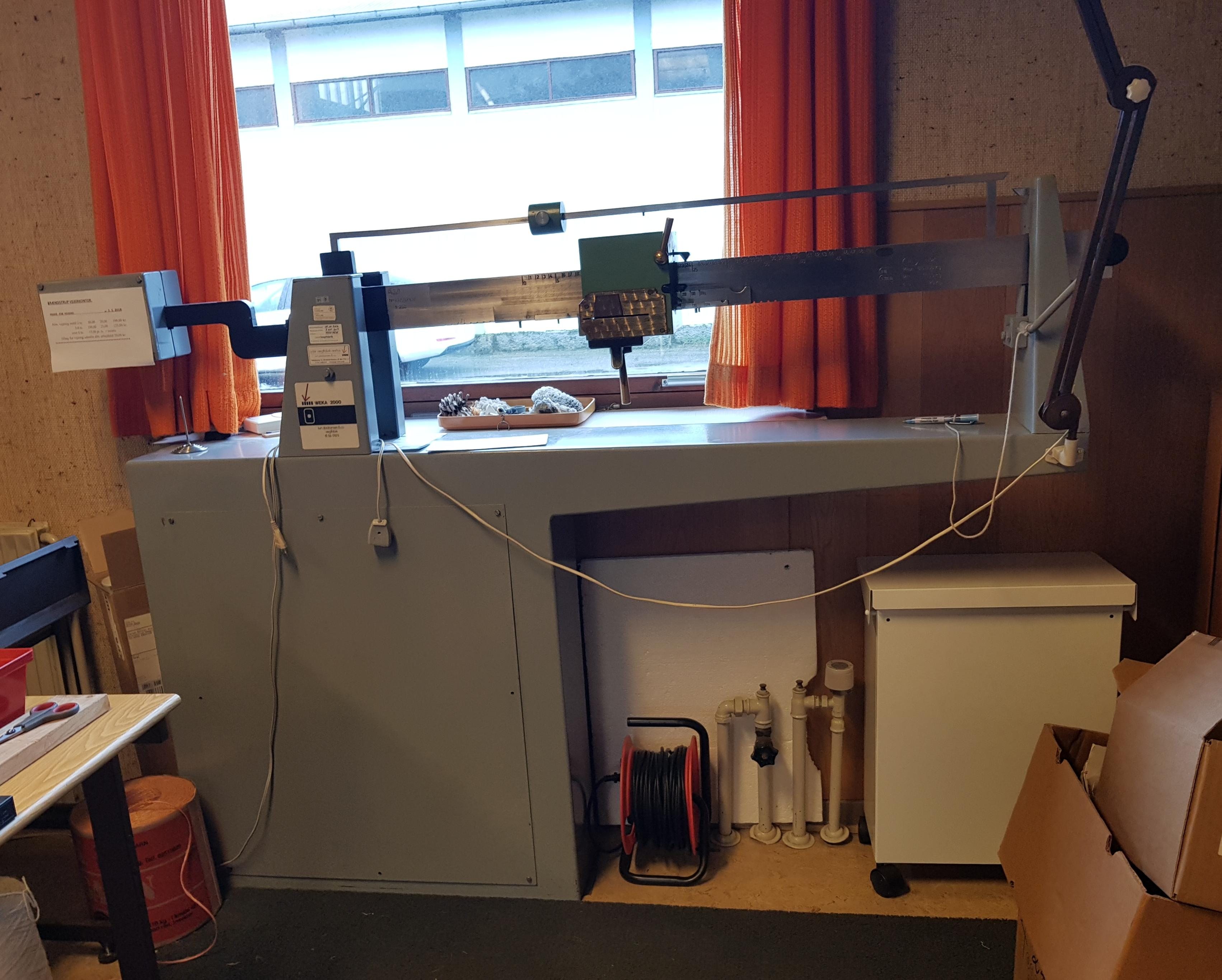 Brændstrup Vejerkontor - stadig aktiv (2019) mekanisk viser til brovægt